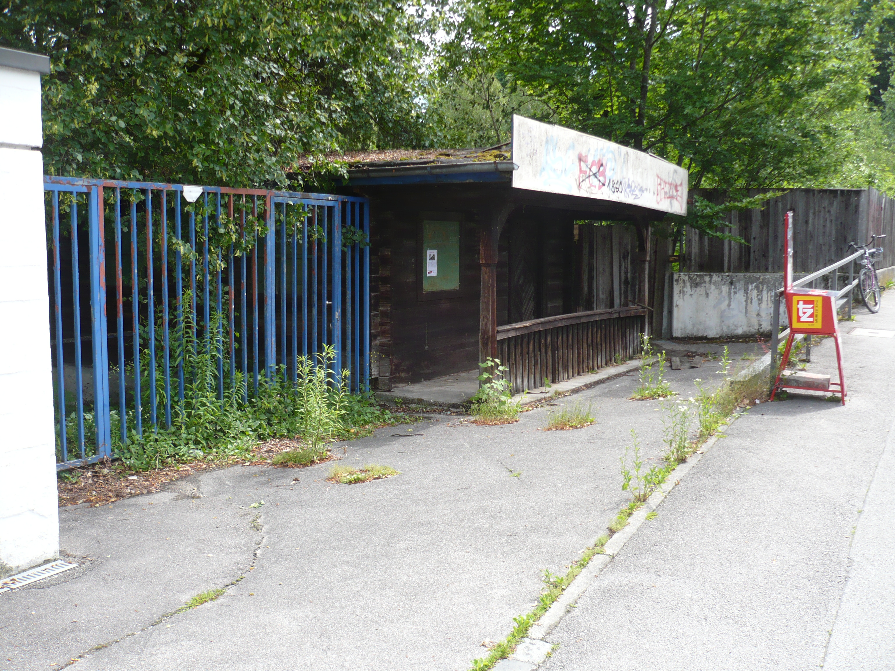 Familienbad Floriansmühle, München, Zustand Juni 2019. Ehemaliger Zugangsbereich